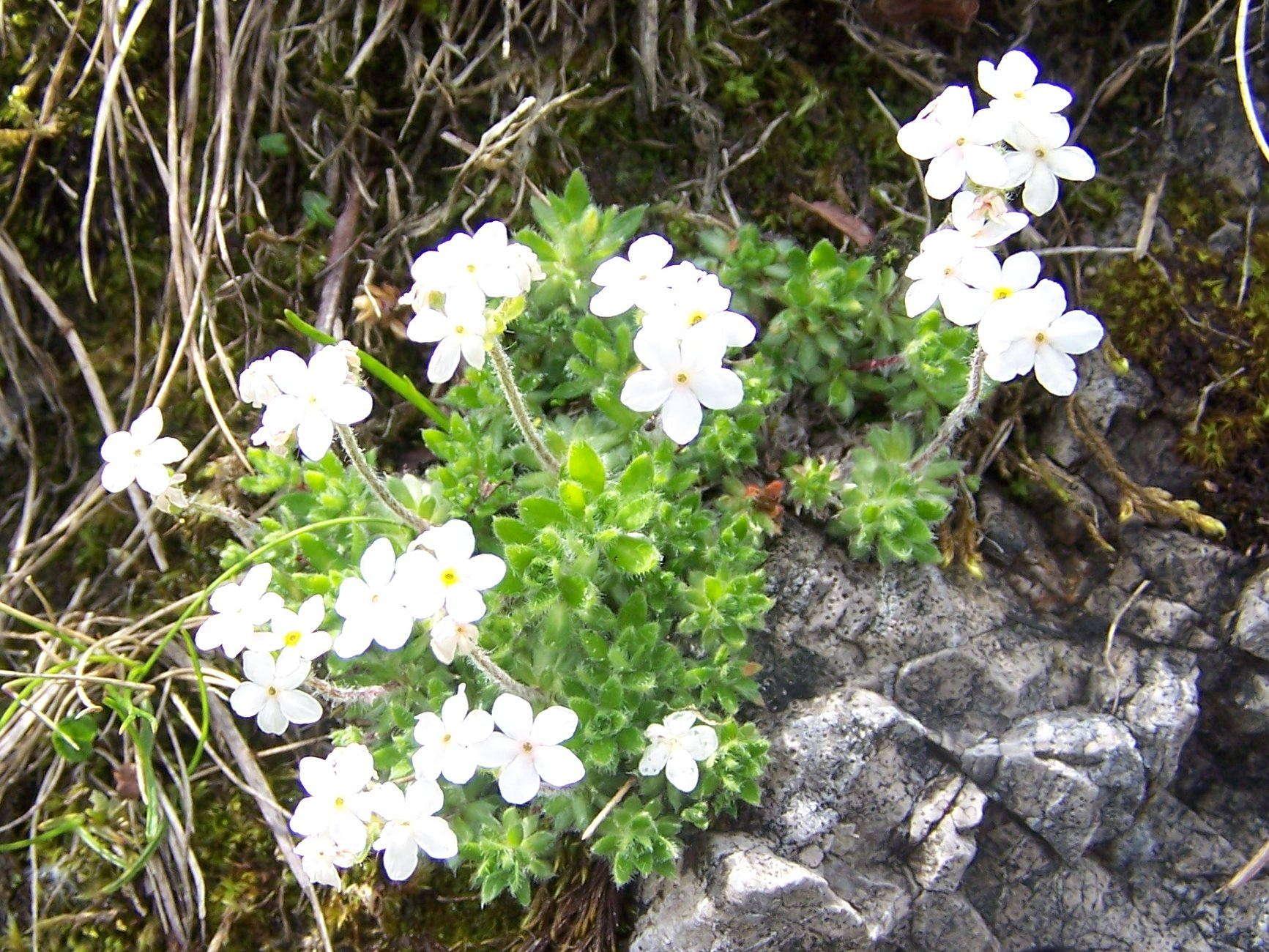 Androsace chamejasme (pl. naradka włosista)